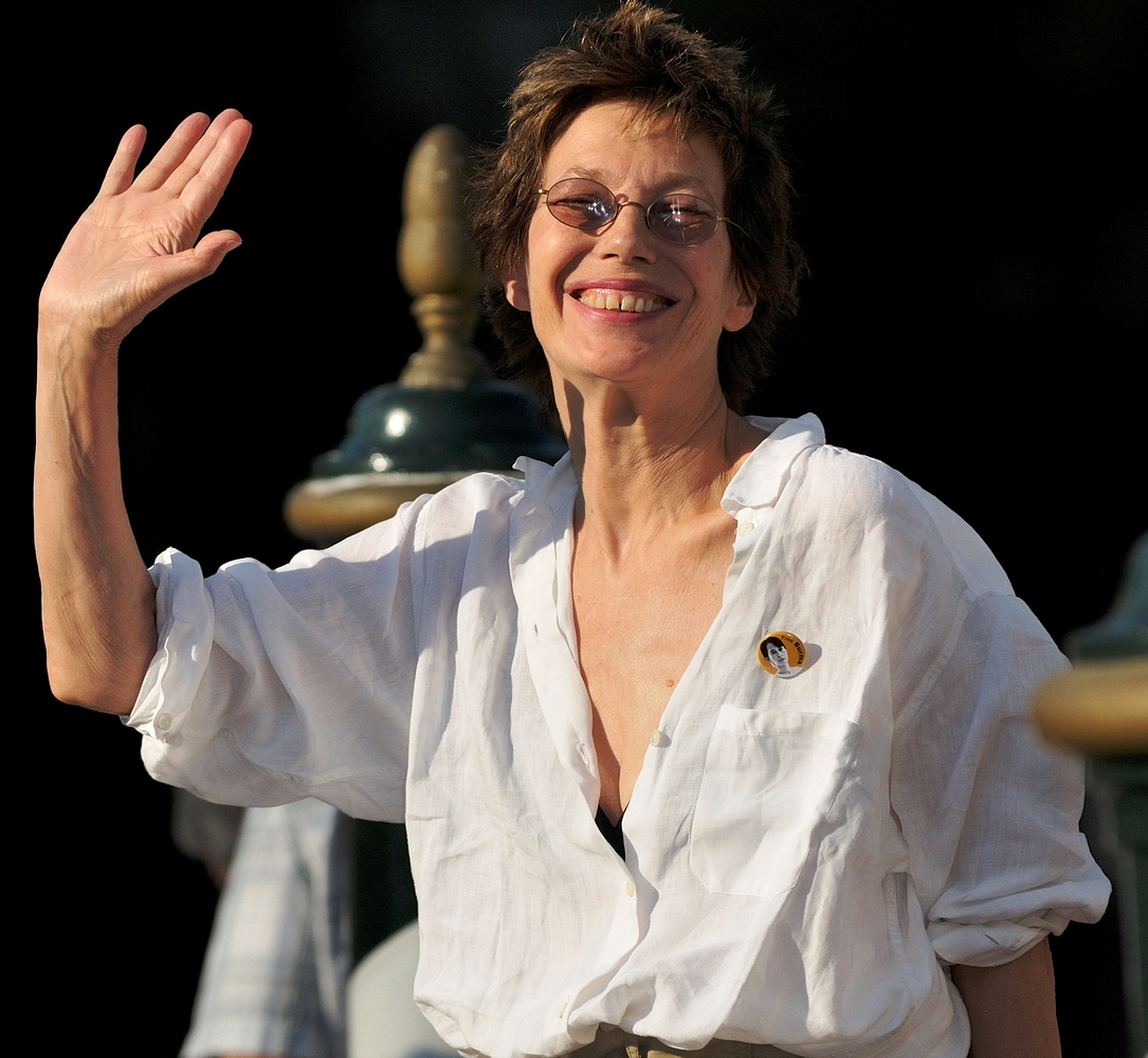 66ème Festival du Cinéma de Venise (Mostra), 6ème jour (07/09/2009) Jane Birkin